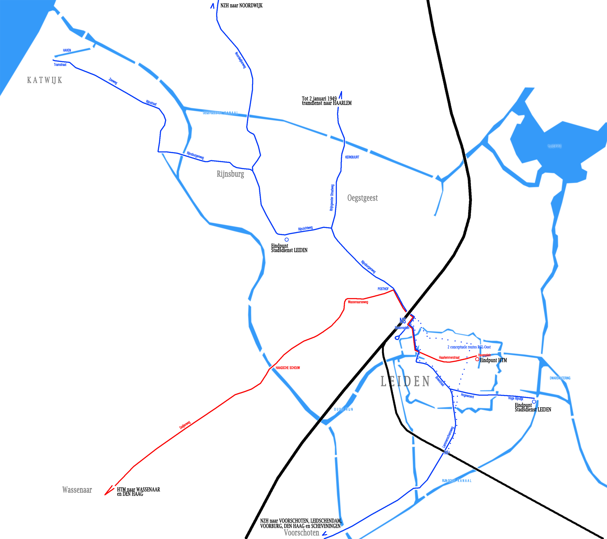 Kaartje van de tramlijnen in Leiden (tot 1961)